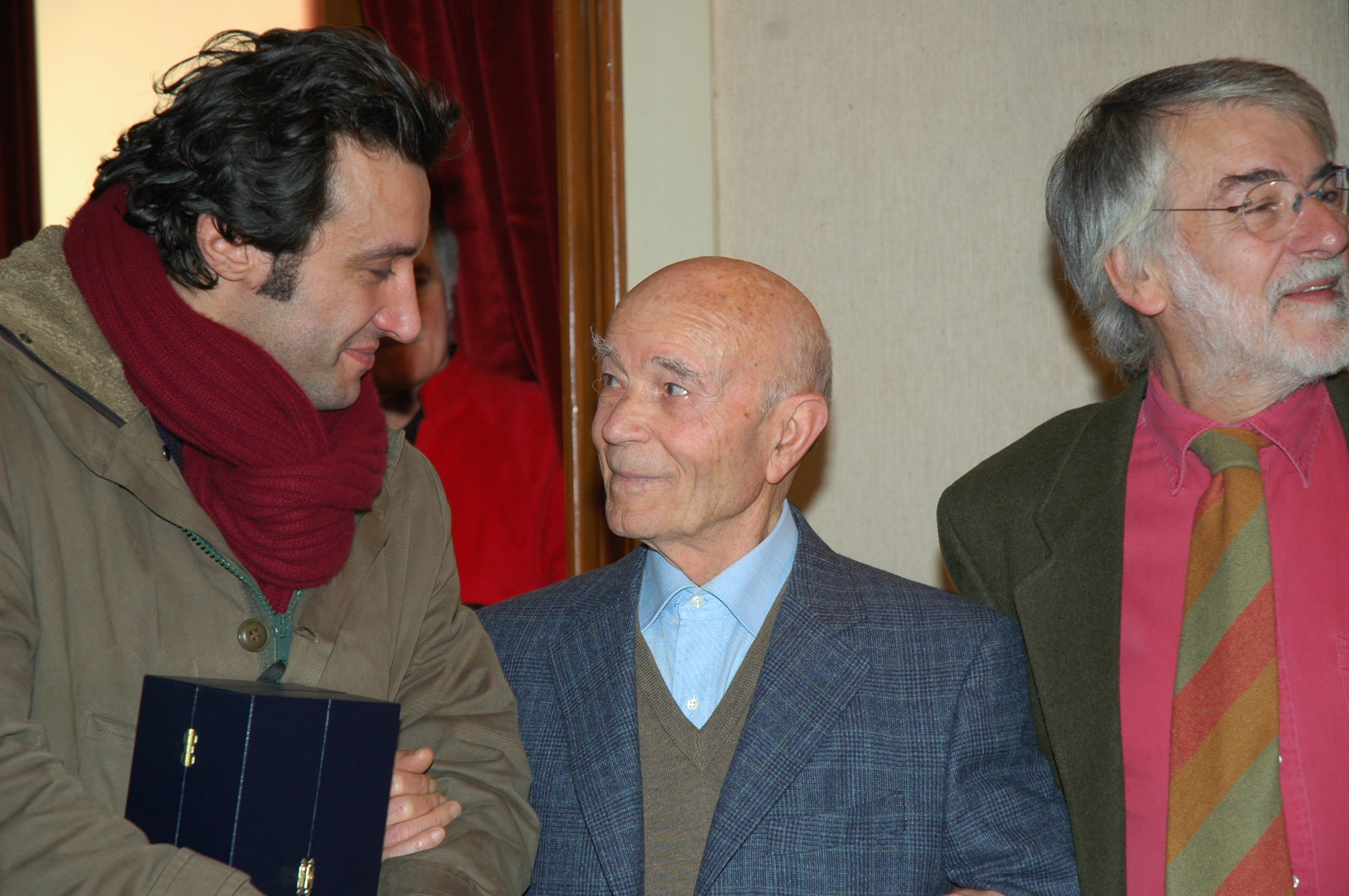 Il Prof.Lisi con Flavio Insinna (interprete di don Pietro Pappagallo nella fiction "La buona Battaglia) in uno sguardo di intesa ed il regista Gianfranco Albano